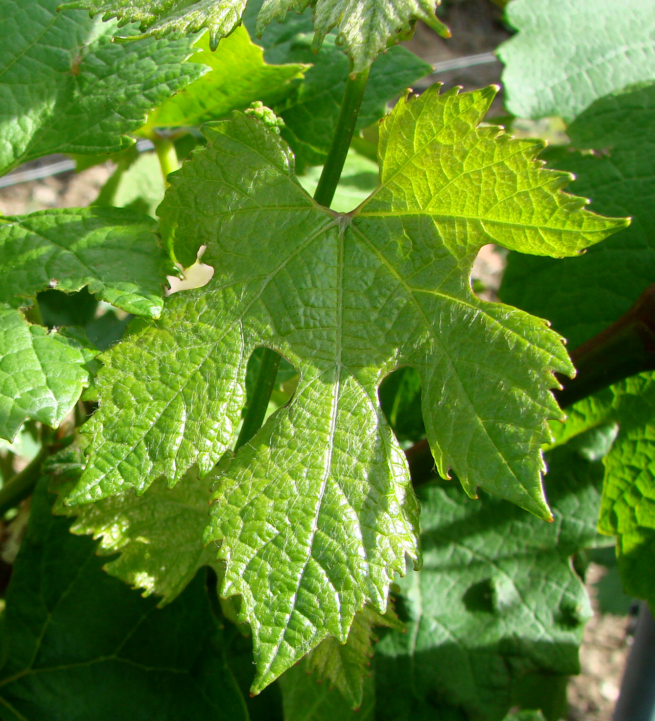 Feuille de vigne (Photo retouchée à l'arrière-plan)